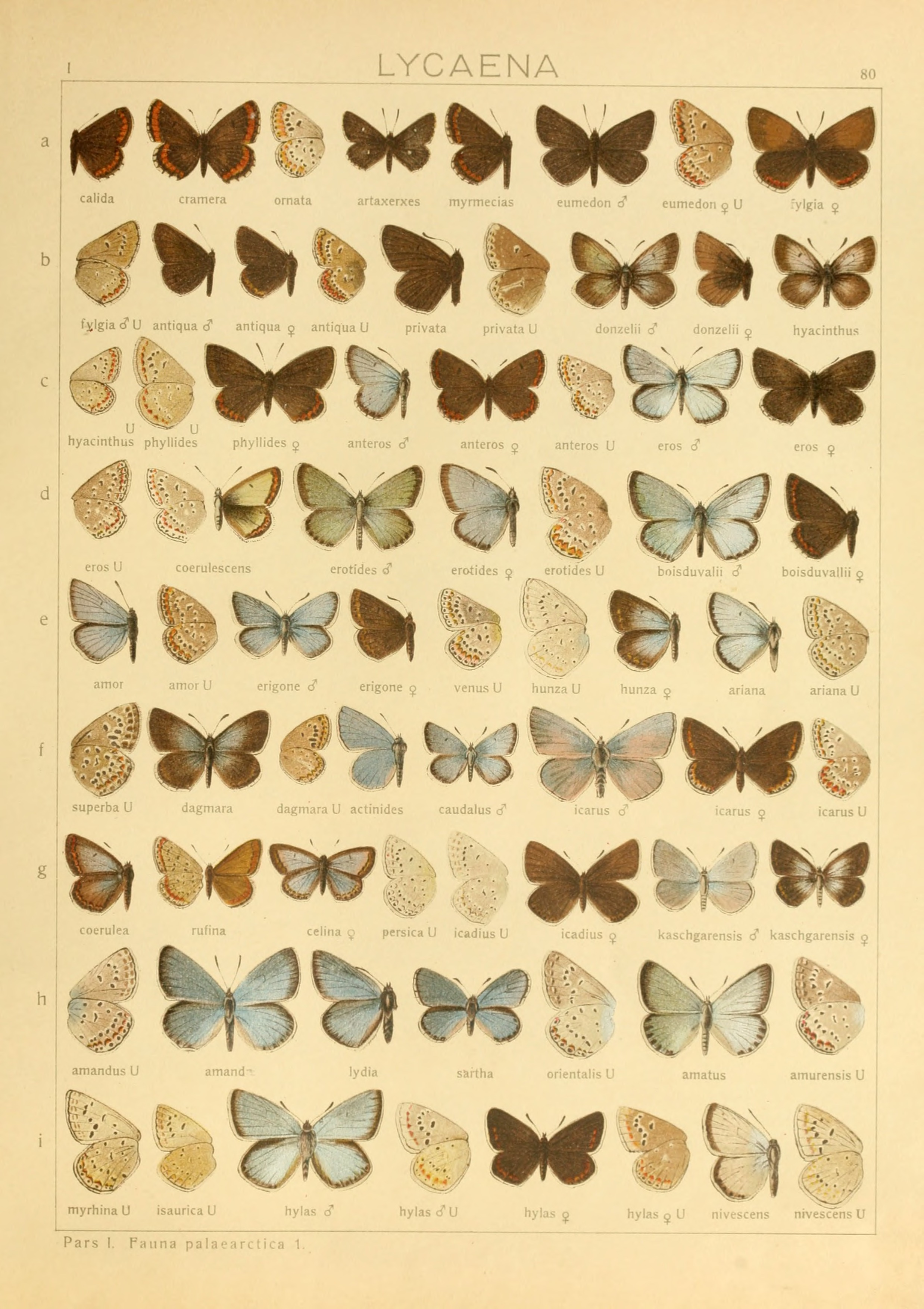 Plate from Seitz, A. Ed., 1900-1909 Die Großschmetterlinge der Erde, Verlag Alfred Kernen, Stuttgart Die Großschmetterlinge des palaearktischen Faunengebietes(The Macrolepidoptera of the world : a systematic account of all the known Macrolepidoptera) Band 1: Abt. 1, Die Großschmetterlinge des palaearktischen Faunengebietes, Die palaearktischen Tagfalter. read text (in German) See The Global Lepidoptera Names Index for valid names